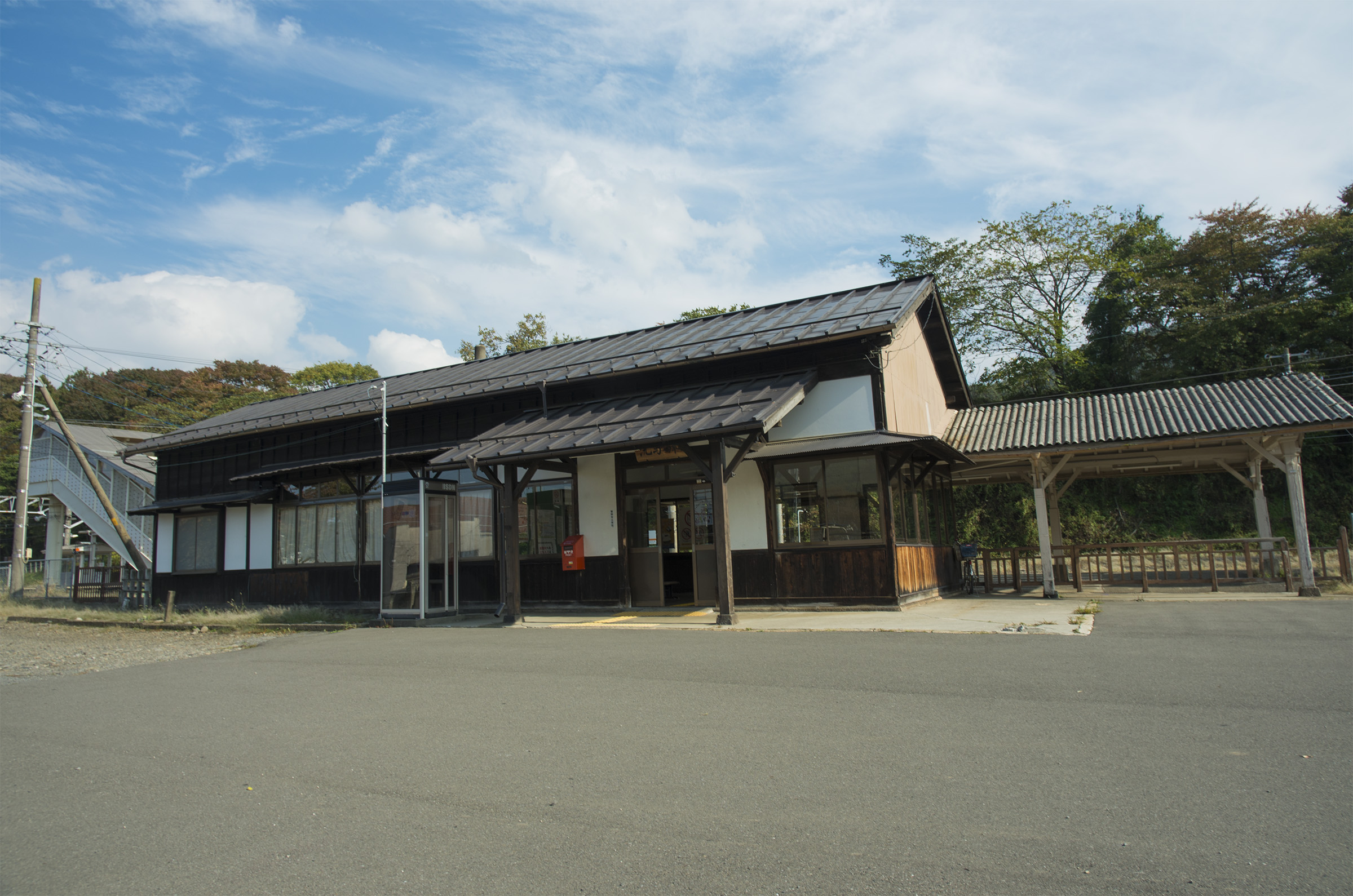 東海旅客鉄道株式会社中央本線洗馬駅